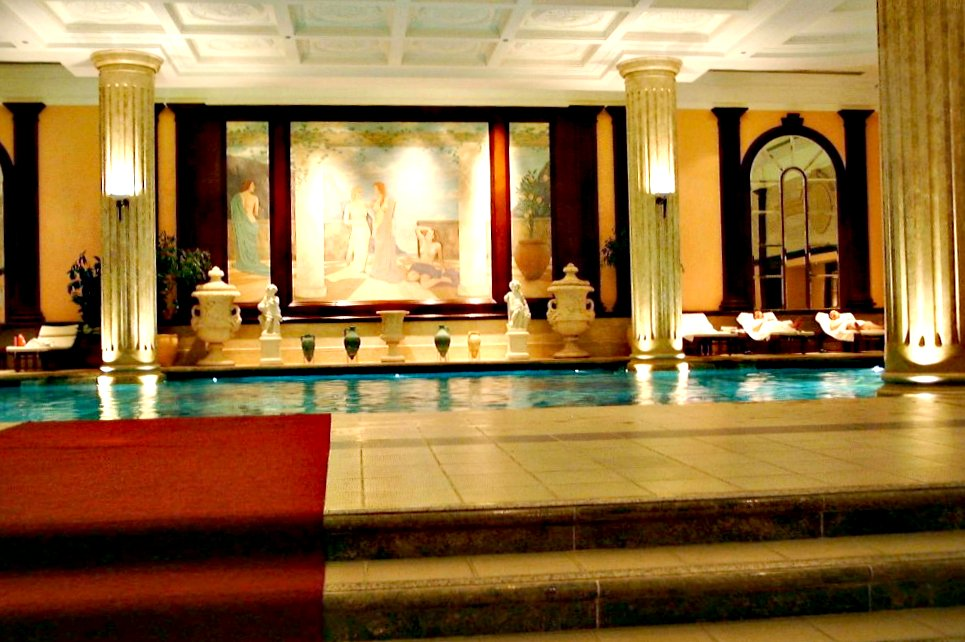 Hong Kong Parkview Swimming Pool 陽明山莊